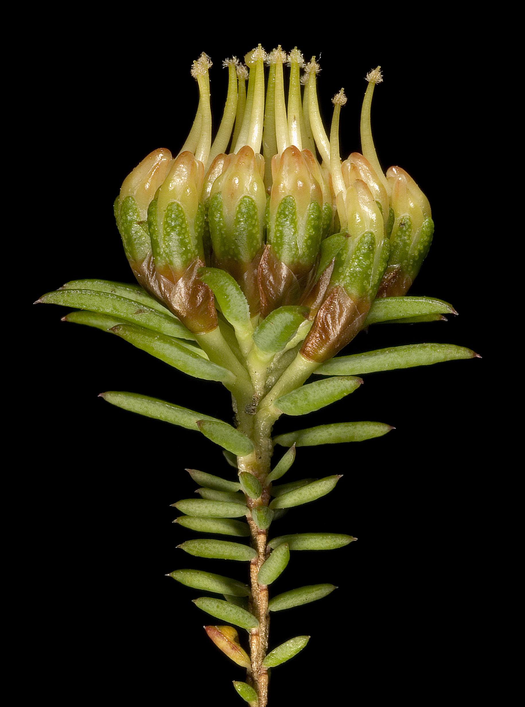 KRT3920